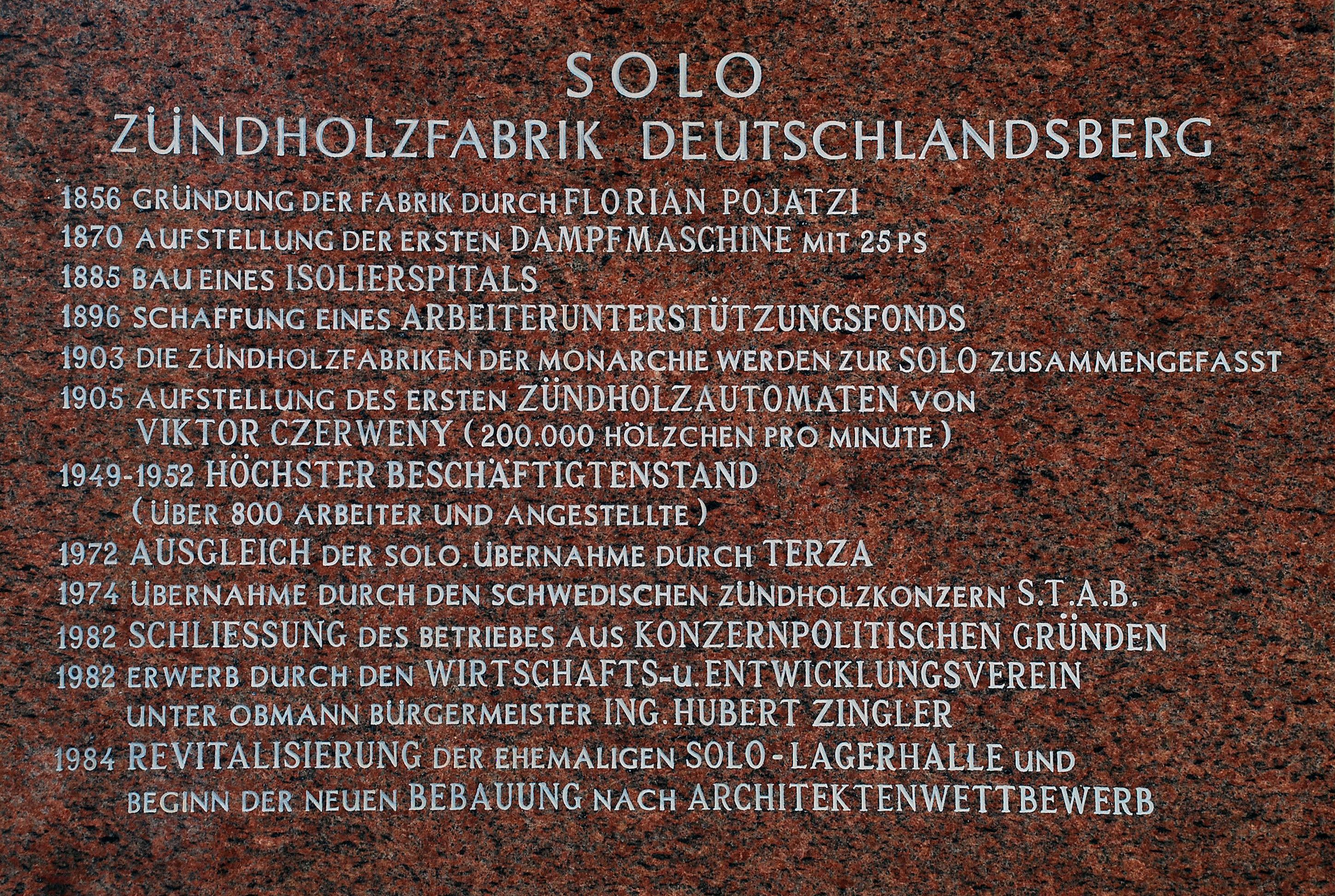 Deutschlandsberg, Steiermark, Österreich: Zeittafel der ehemaligen Zündholzfabrik SOLO Deutschlandsberg